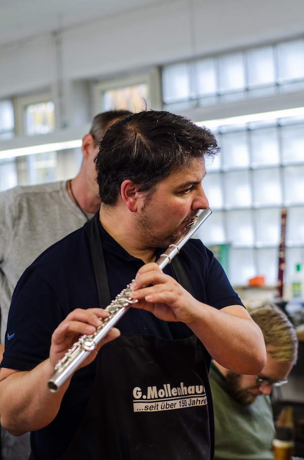 Tino Schaub ist Holzblasinstrumentenmachermeister.